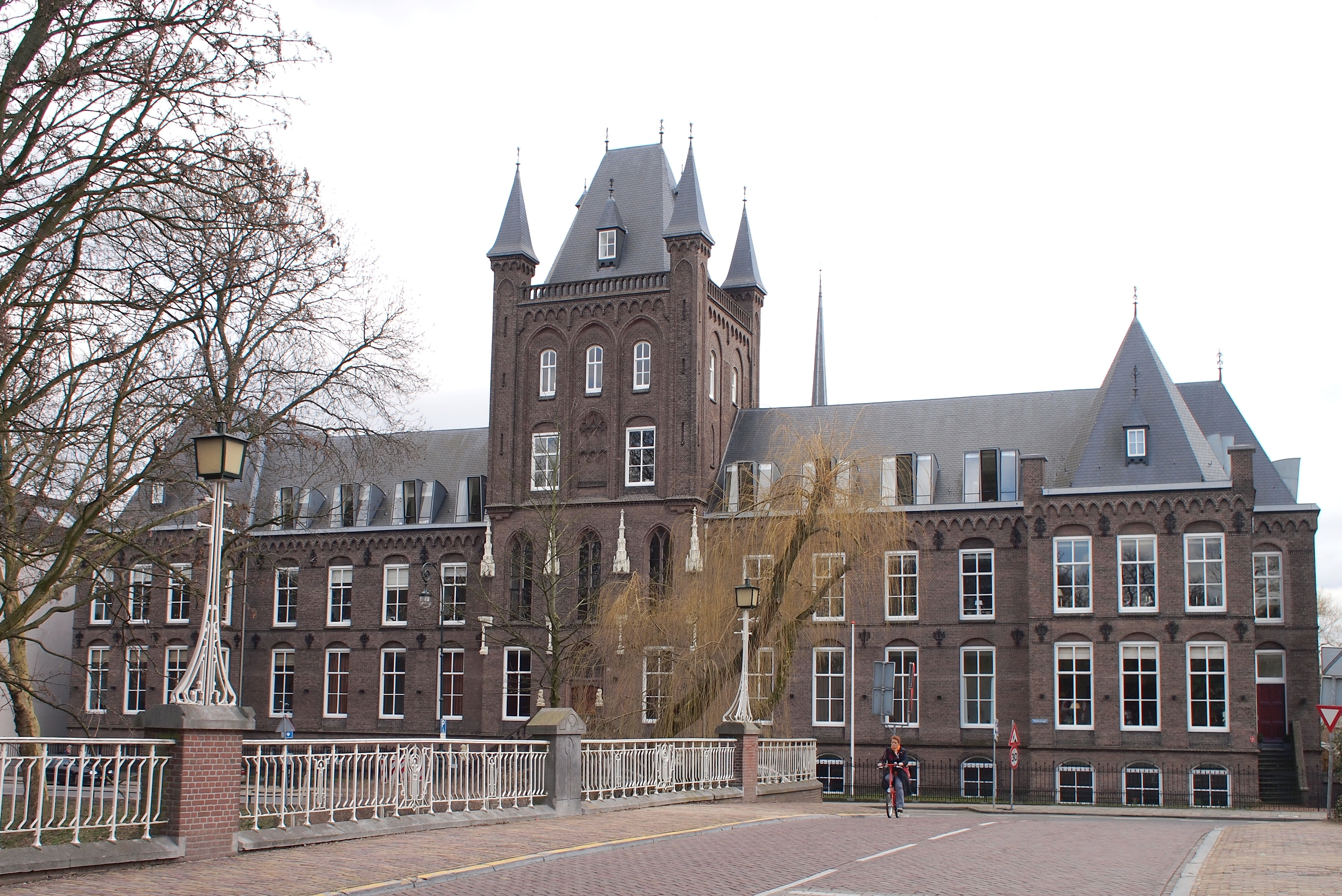 Hiëronymushuis, Maliesingel 77 te Utrecht. Tevens zichtbaar deel van de Abstederbrug